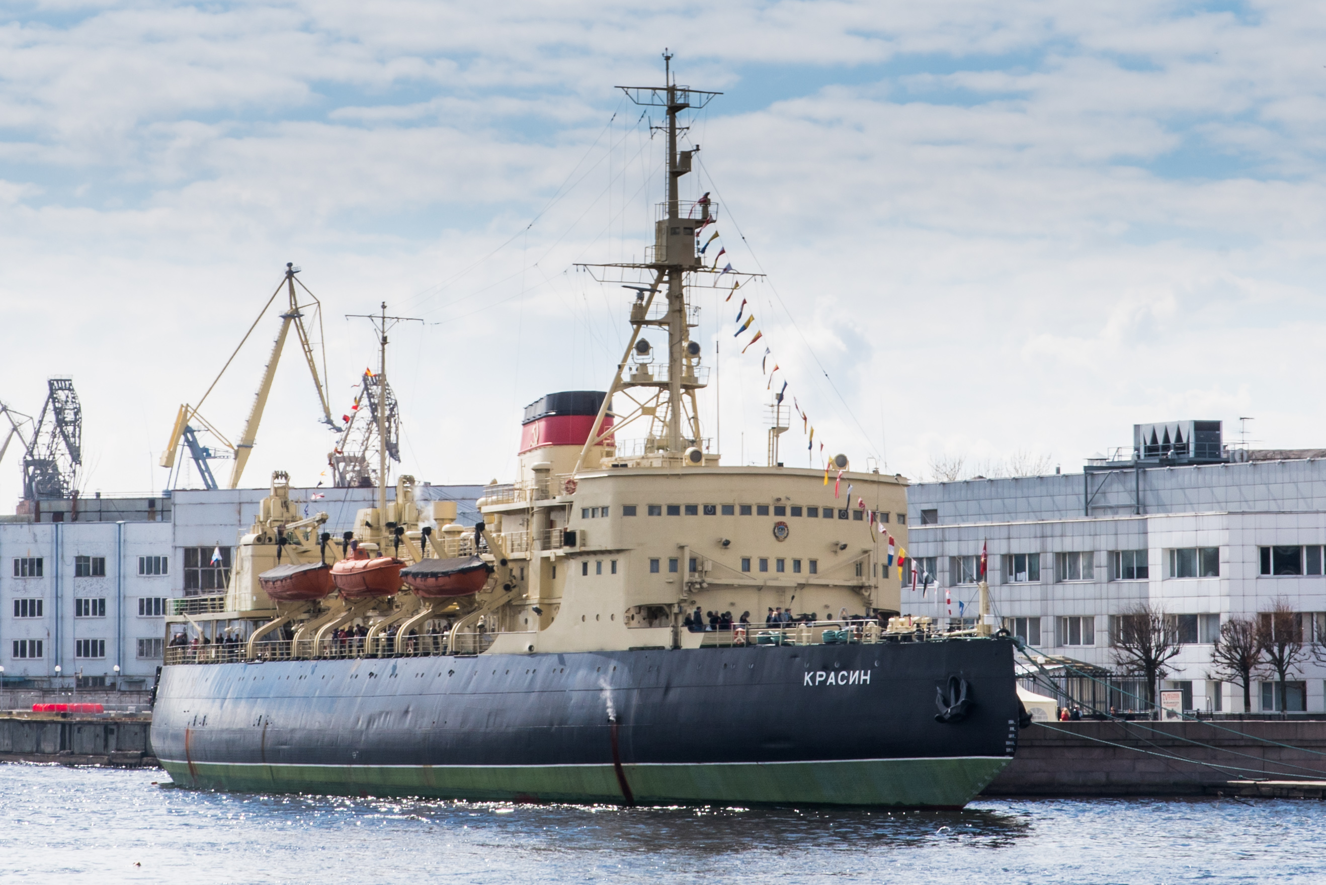 V Фестиваль ледоколов в СПб. Ледокол Красин. Вид с ледокола Новороссийск